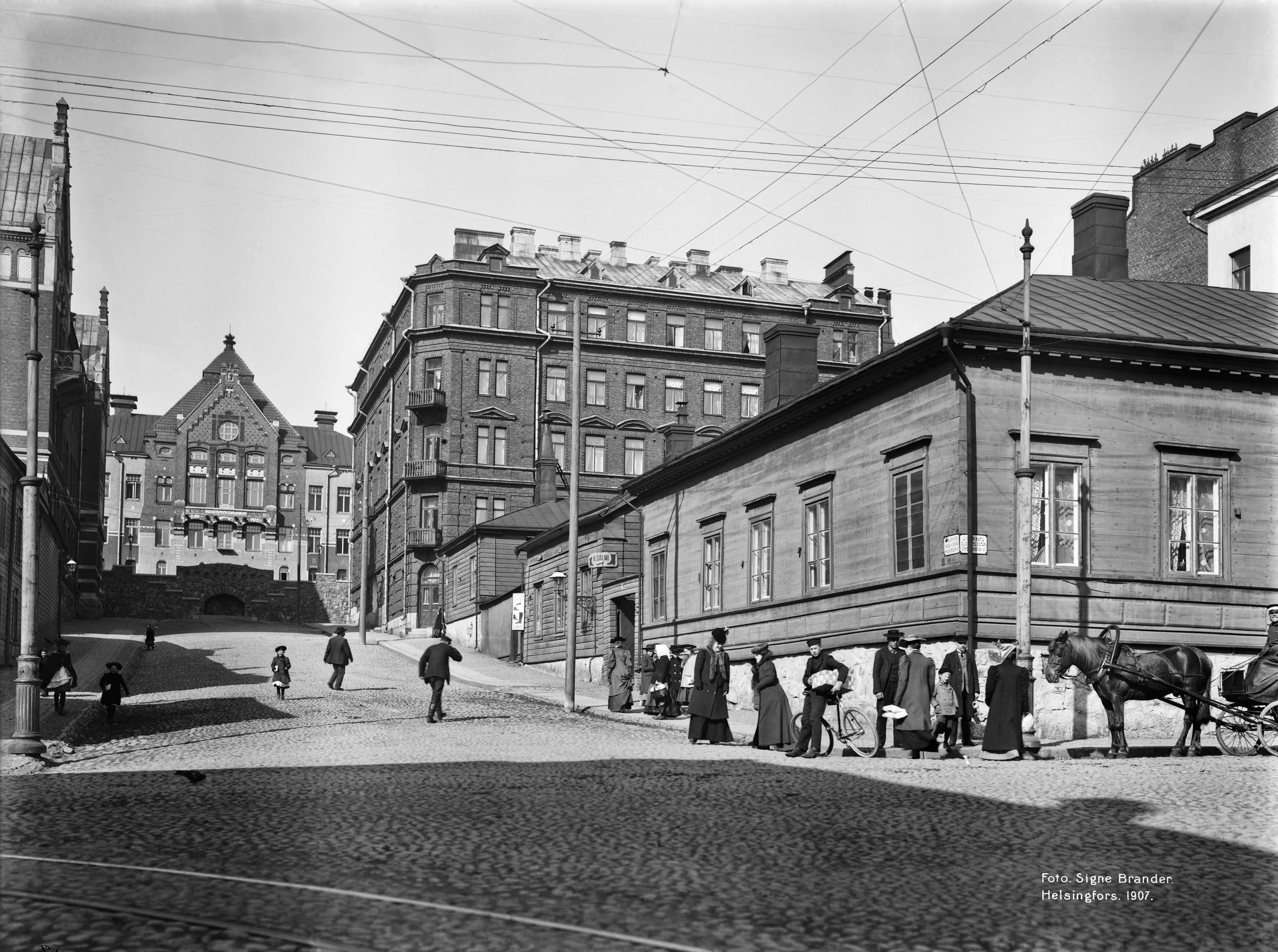 Nikolainkatu (Snellmaninkatu) 27, 29; negatiivi ja vedos, lasi paperi pahvi, mv